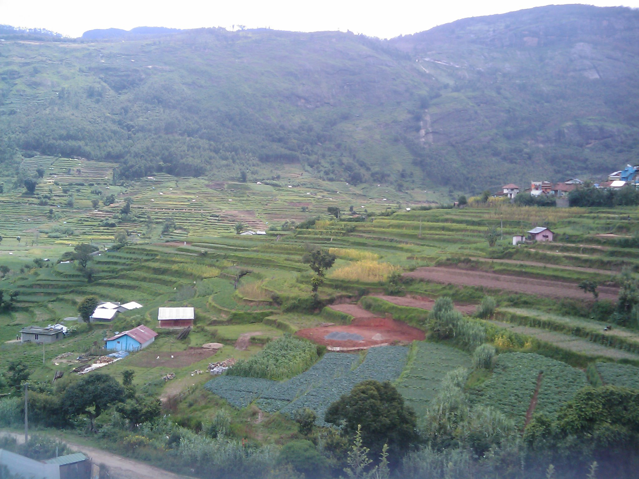 കോവിലൂർ ടൌണ്‍ അടുത്തുള്ള ഗ്രാമം